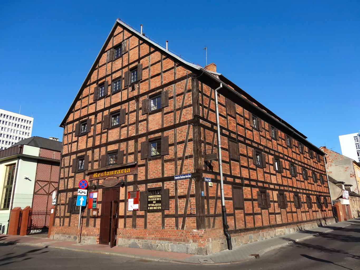 Spichlerz nad Brdą w Bydgoszczy przy ul. Stary Port zbud. w latach 30. XIX wieku